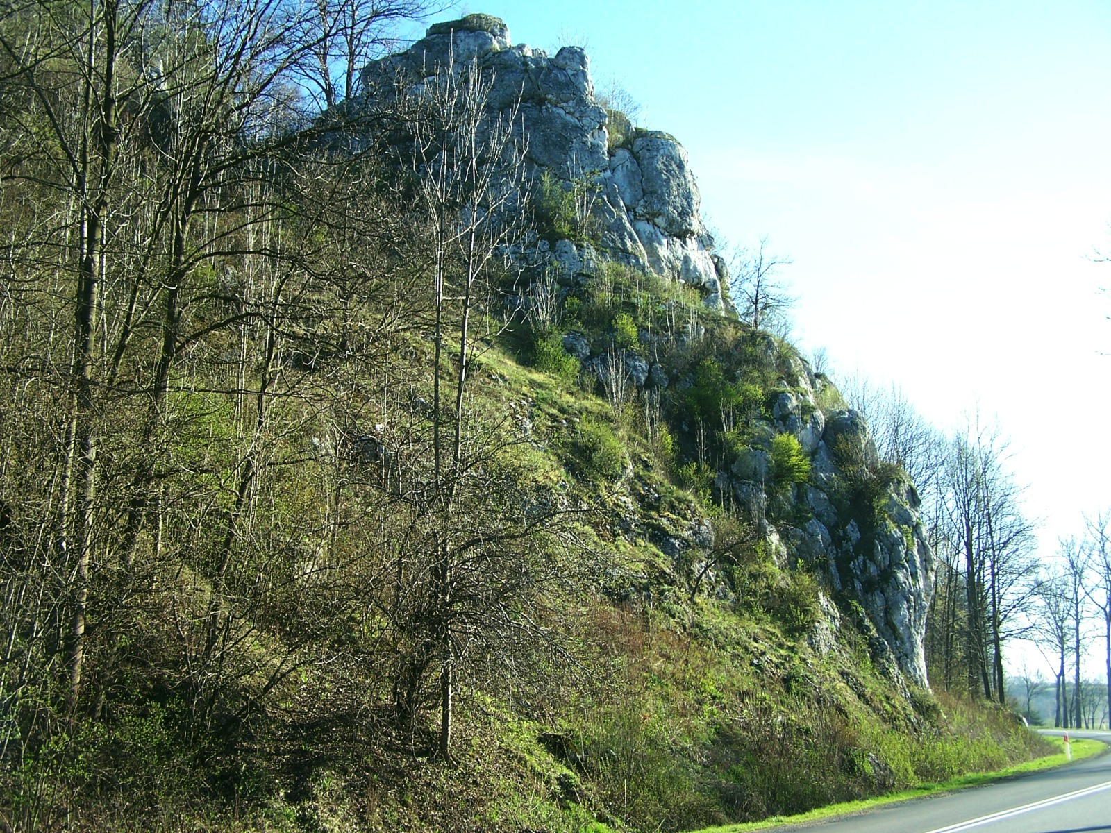 Nature reserve Skała Kmity